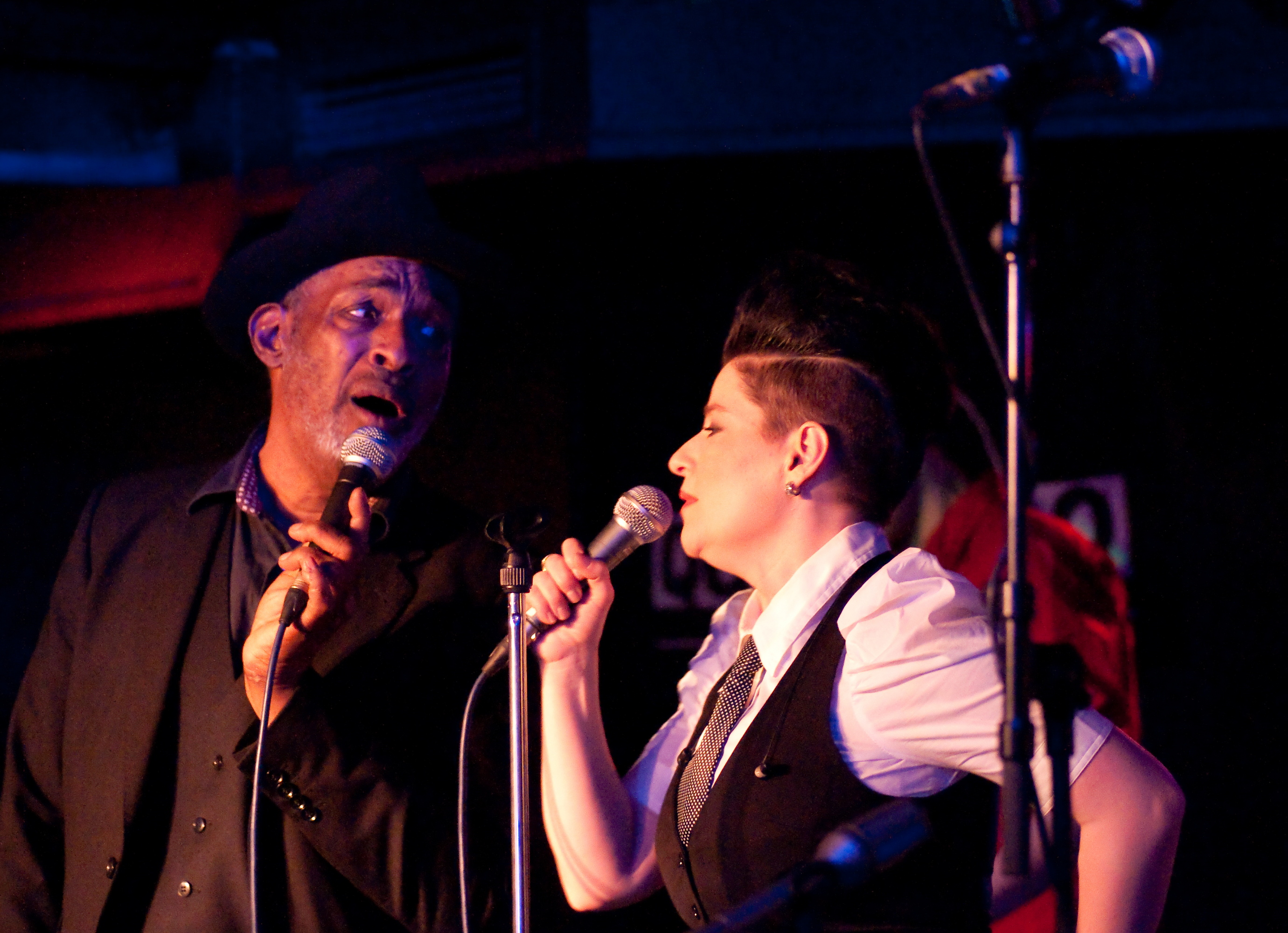 Brixtonboogie (Wayne Martin & Masha Litterscheid) live im Quasimodo in Berlin am 30.04.2010